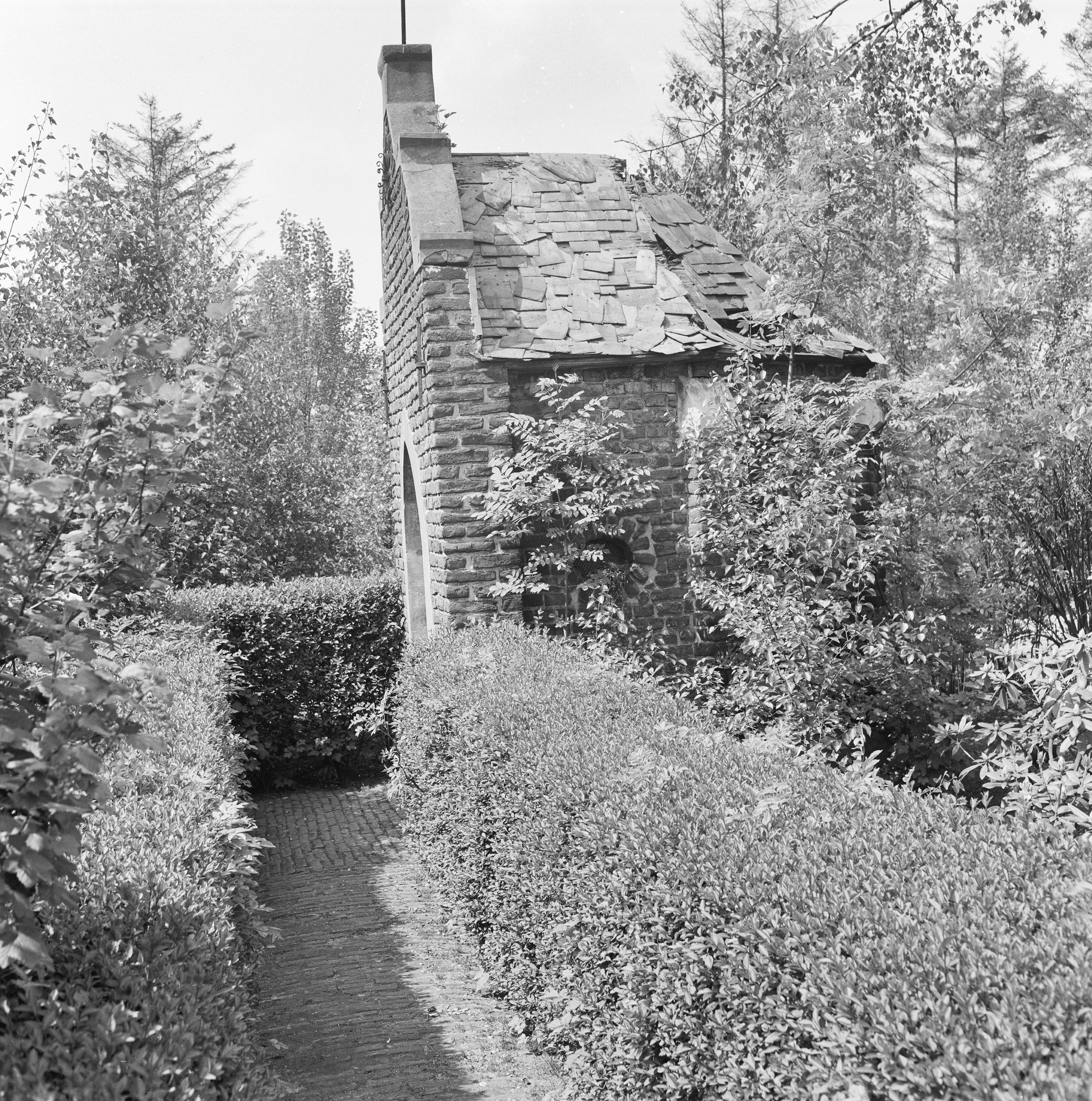 Sint Anthoniuskapel, Steinhagenstraat 27